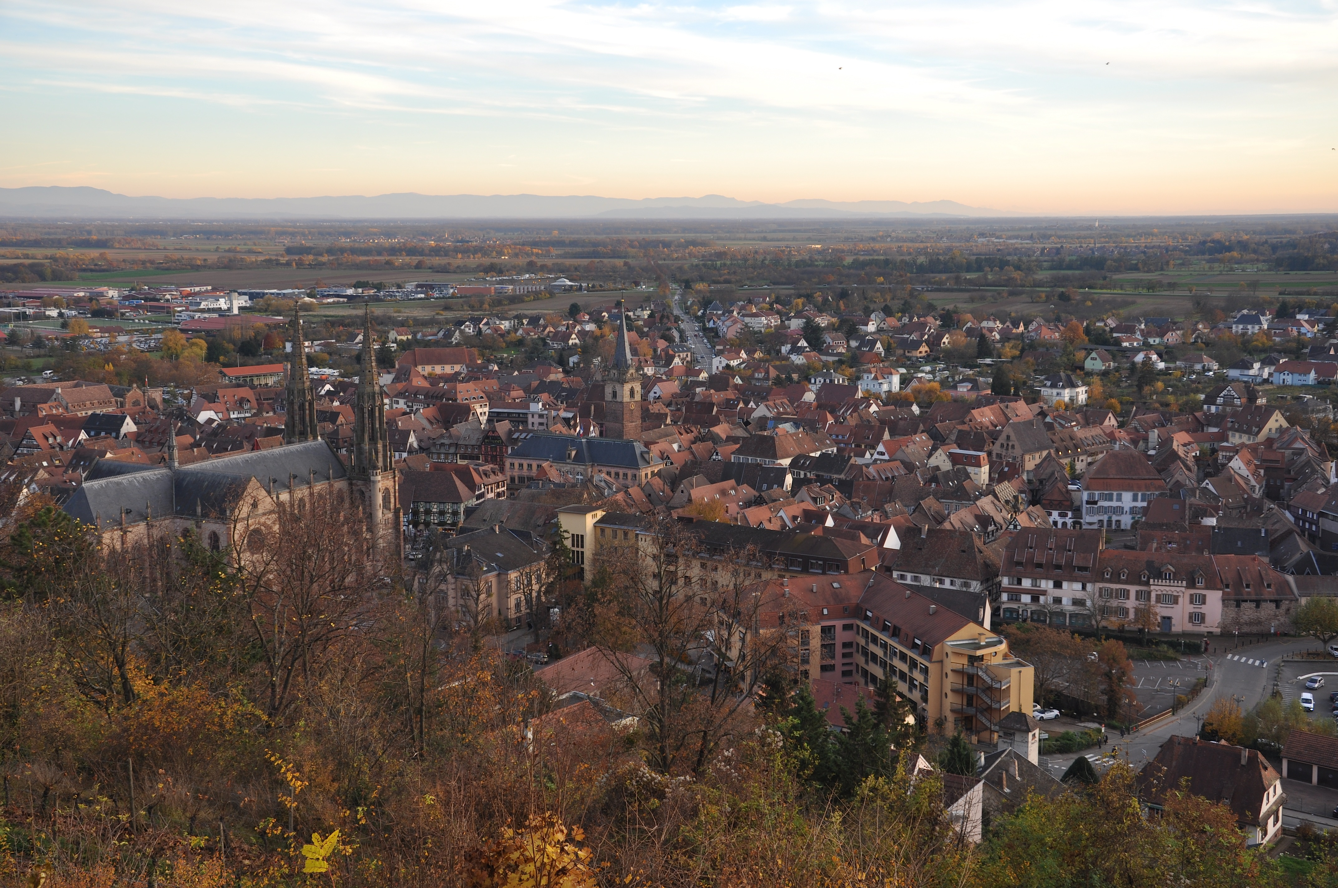 Obernai, vue générale